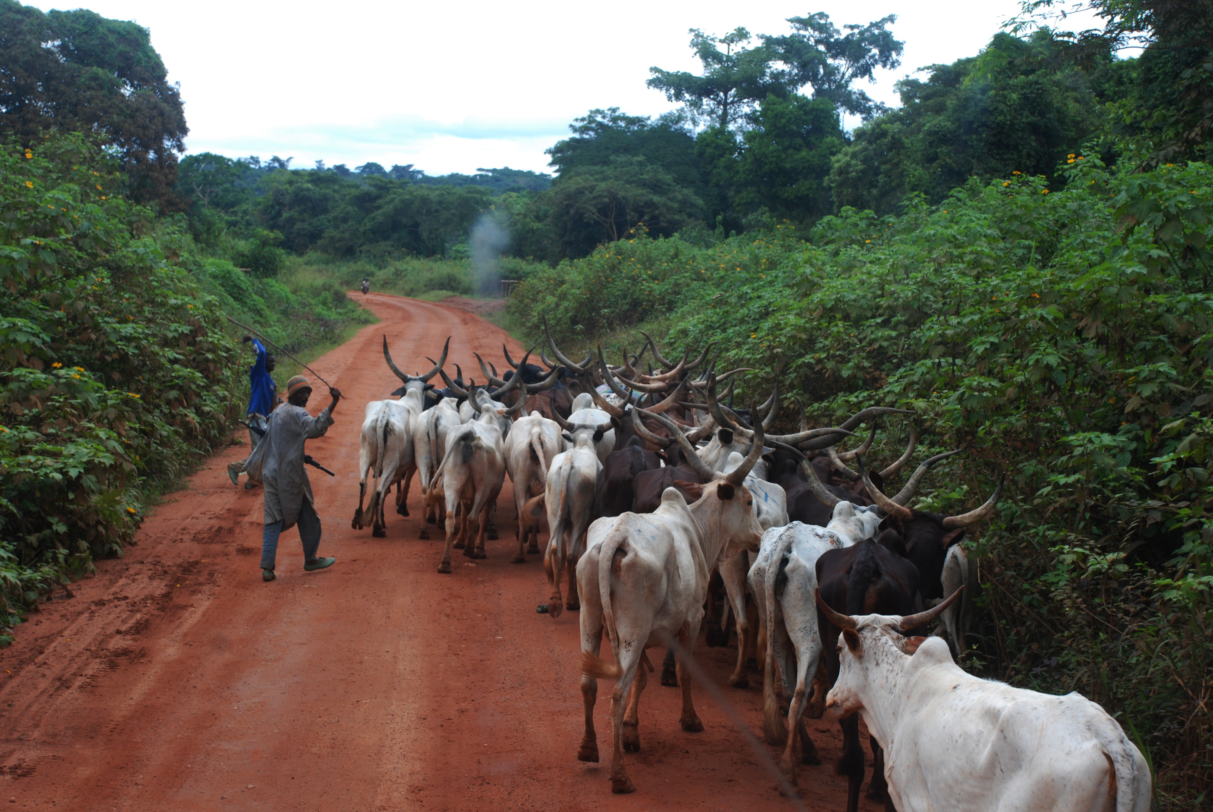 Une caravane de Boeufs sur une route non bitumée dans la localité de Yokadouma dans la région de l'Est du Cameroun